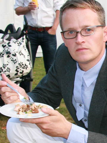 Daan Samson tijdens het tuinfeest van Museum Dhondt-Dhaenens (2009, Deurle, België)